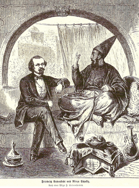 Friedrich Bodenstedt und Mirza Schaffy. H: 20.8 cm, B: 17.4 cm Papier: H: 31.6 cm, B: 24 cm. Zeitungspapier